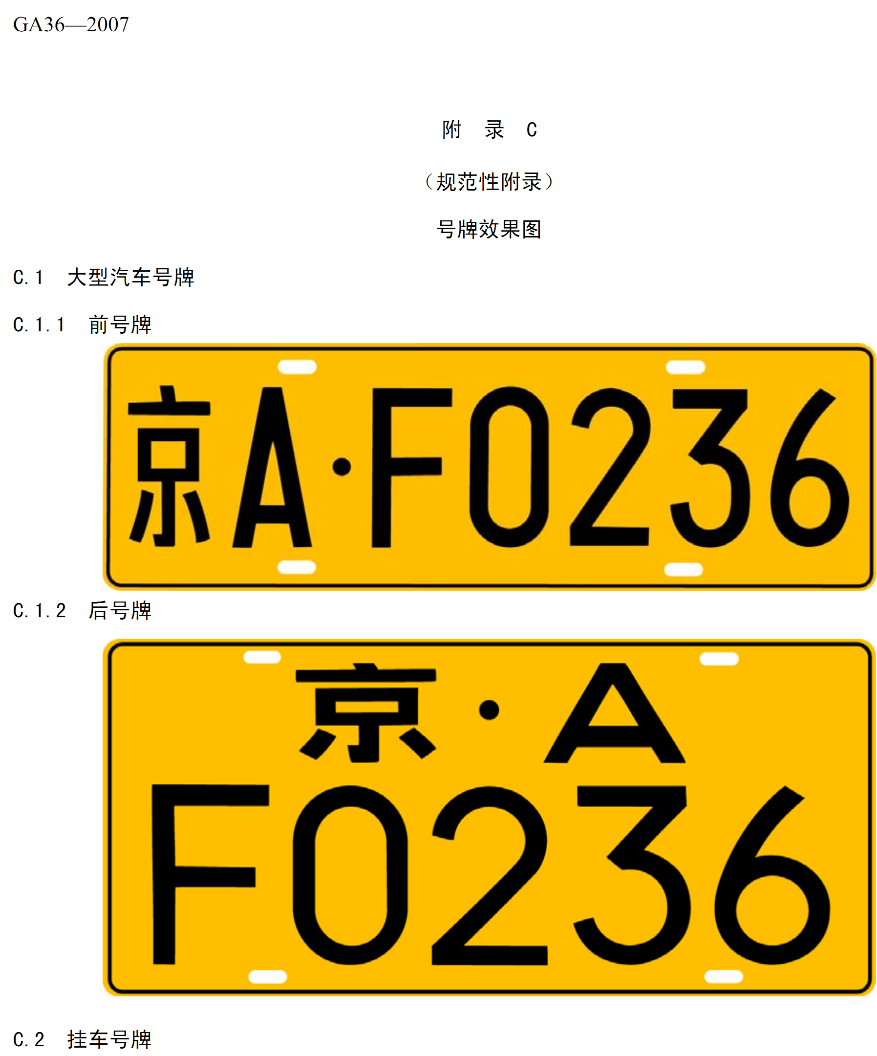 中文（中国大陆）: 中华人民共和国机动车号牌示意图(1)